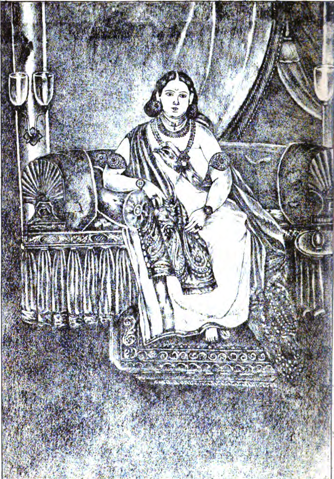 Her Highness Lekshmi Bhye